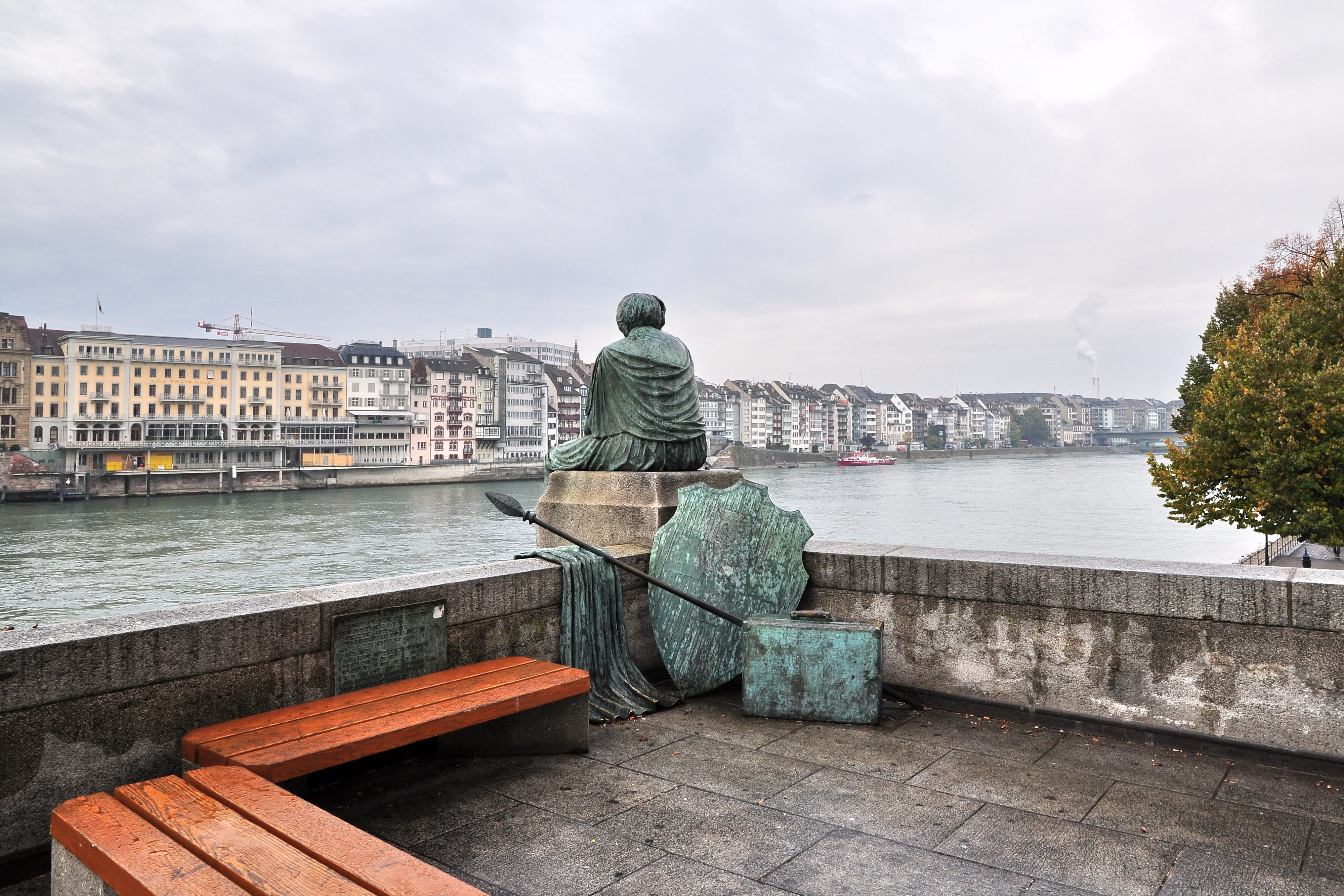 Helvetia auf der Reise, Mittlere Rheinbrücke (Greifengasse) in Basel (Switzerland)